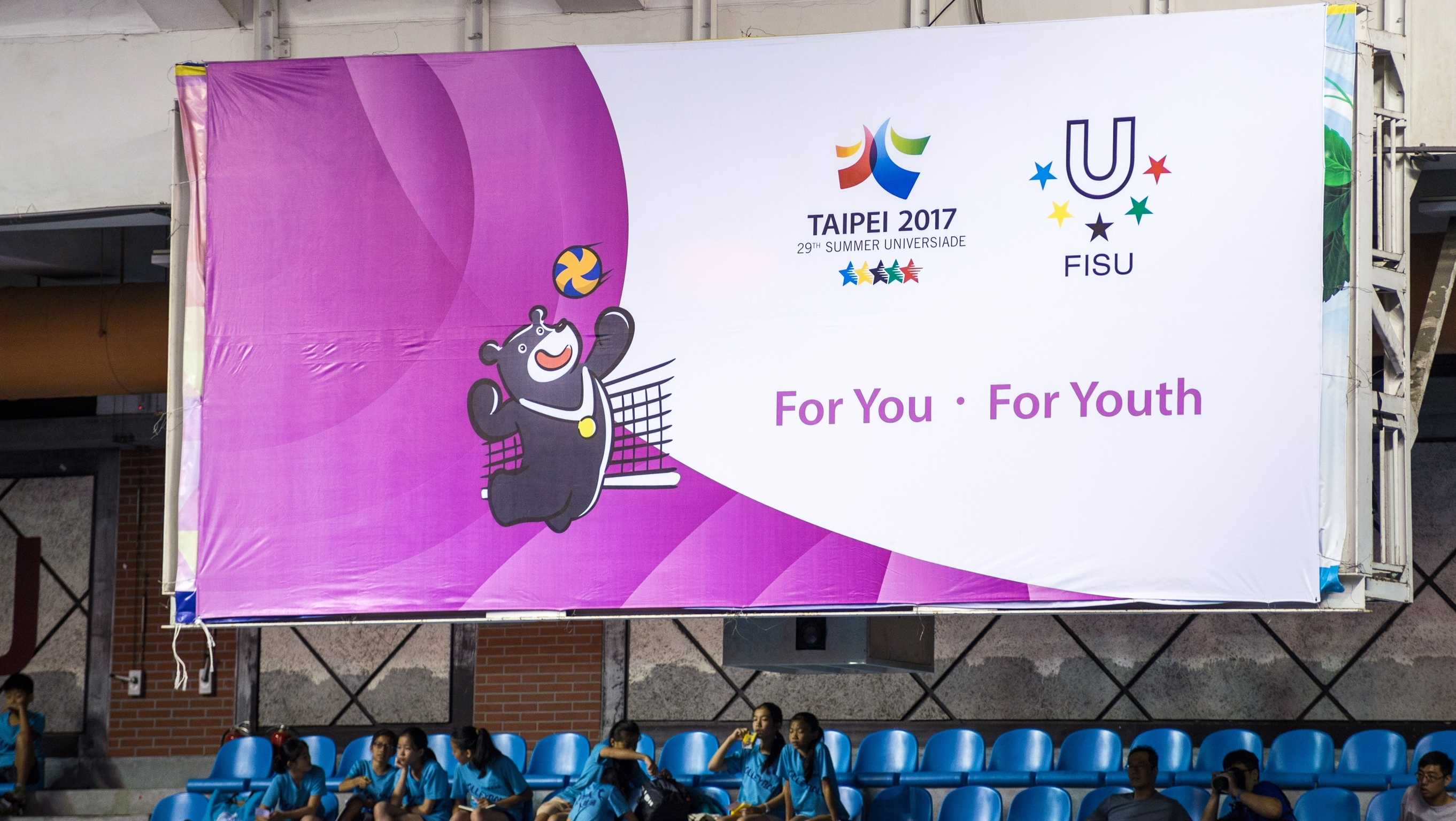 中文（台灣）: 2017世大運女子排球賽，烏克蘭對加拿大